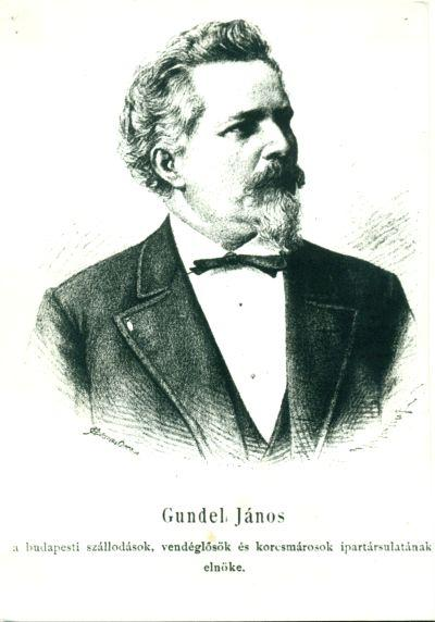 Gundel János a Budapesti Szállodások és Vendéglősök Ipartestületének elnöke